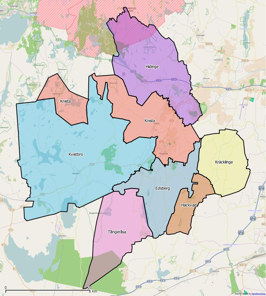 Distriktsindelningen i Kristinehamns kommun World file: 68.66287783644948206 0 0 -68.66287783644948206 1616539.37547018239274621 8254328.16490792110562325